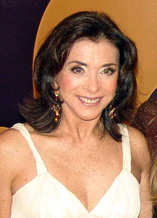 A atriz brasileira Betty Faria, em 2006.